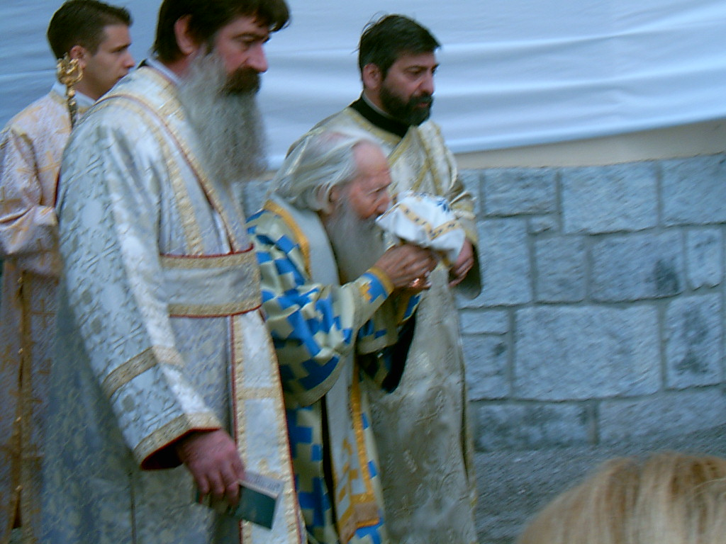 Дигитална слика.Патријарх Павле у Љубљани.©